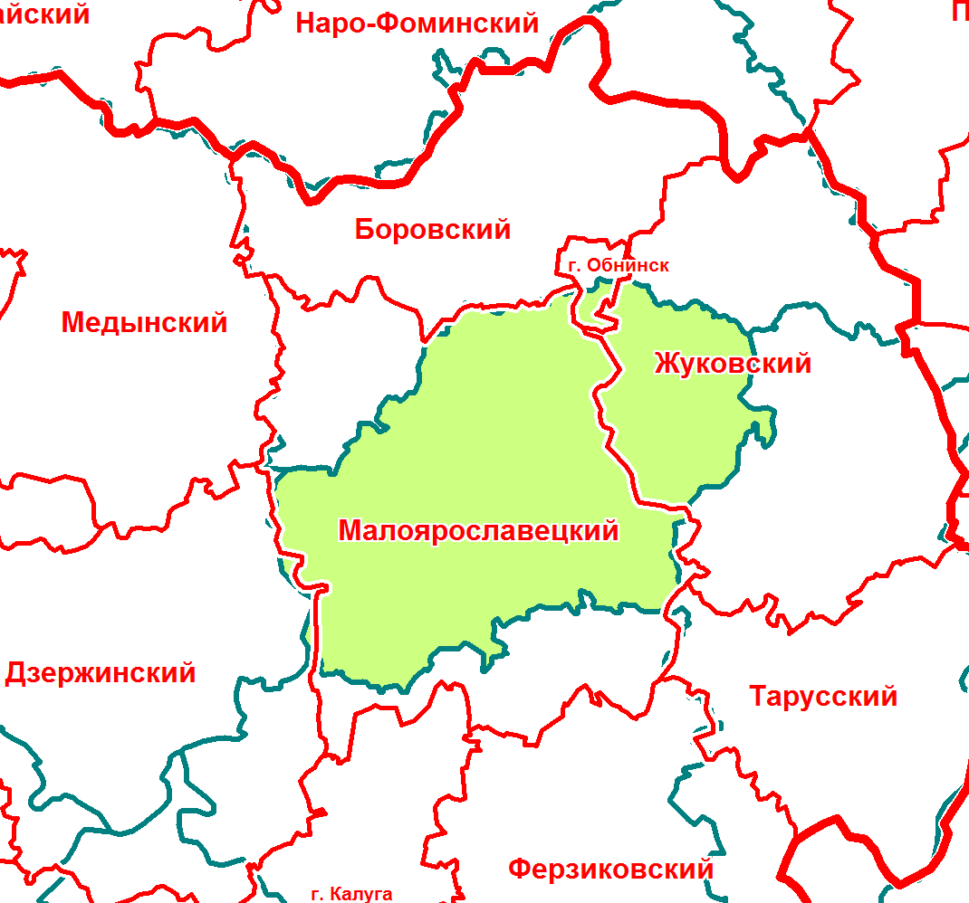 Малоярославецкий уезд Калужской губернии в современной сетке районов